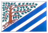 Česky: Vlajka obce Mokré